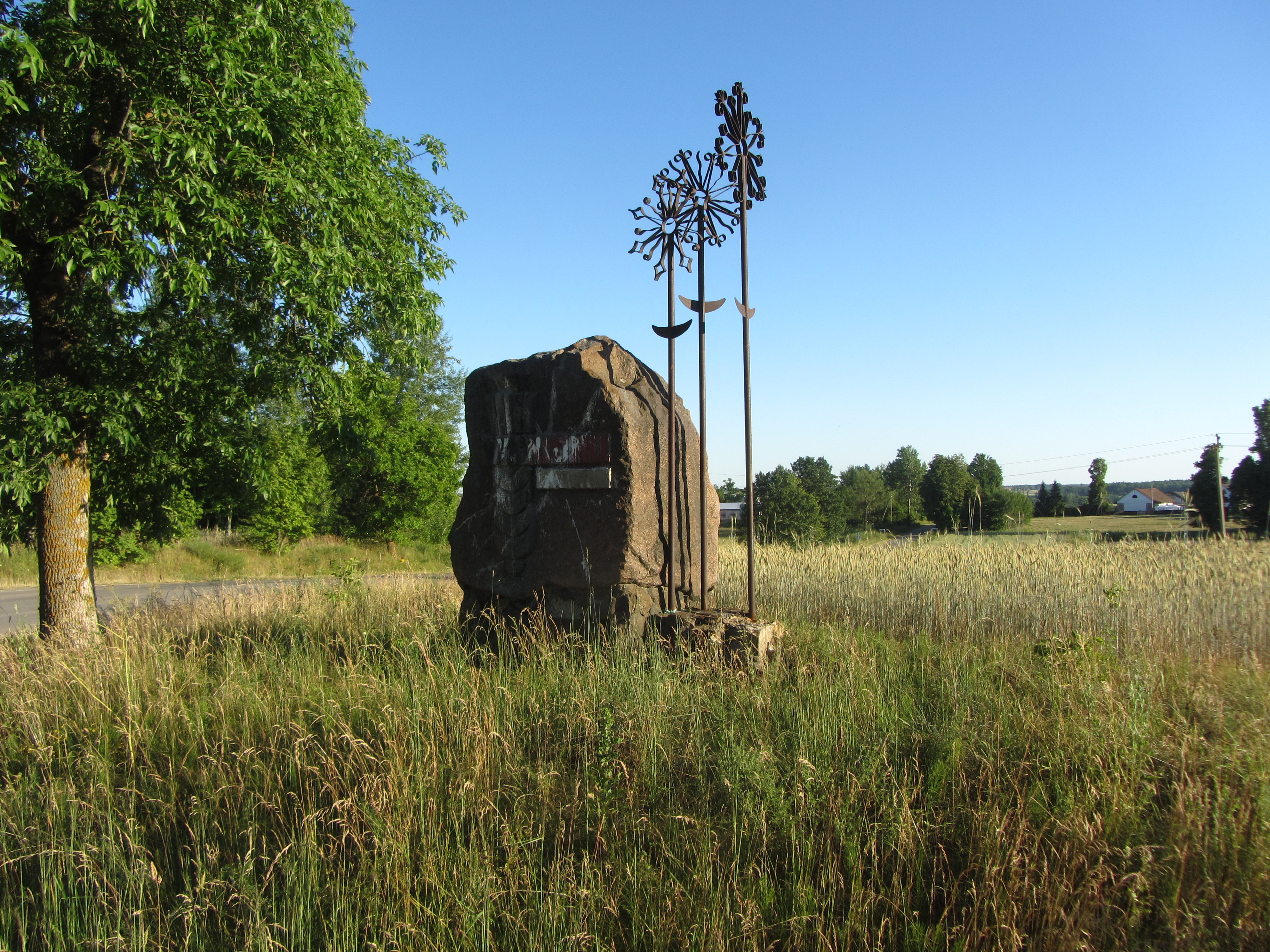 Stakliškių sen., Lithuania